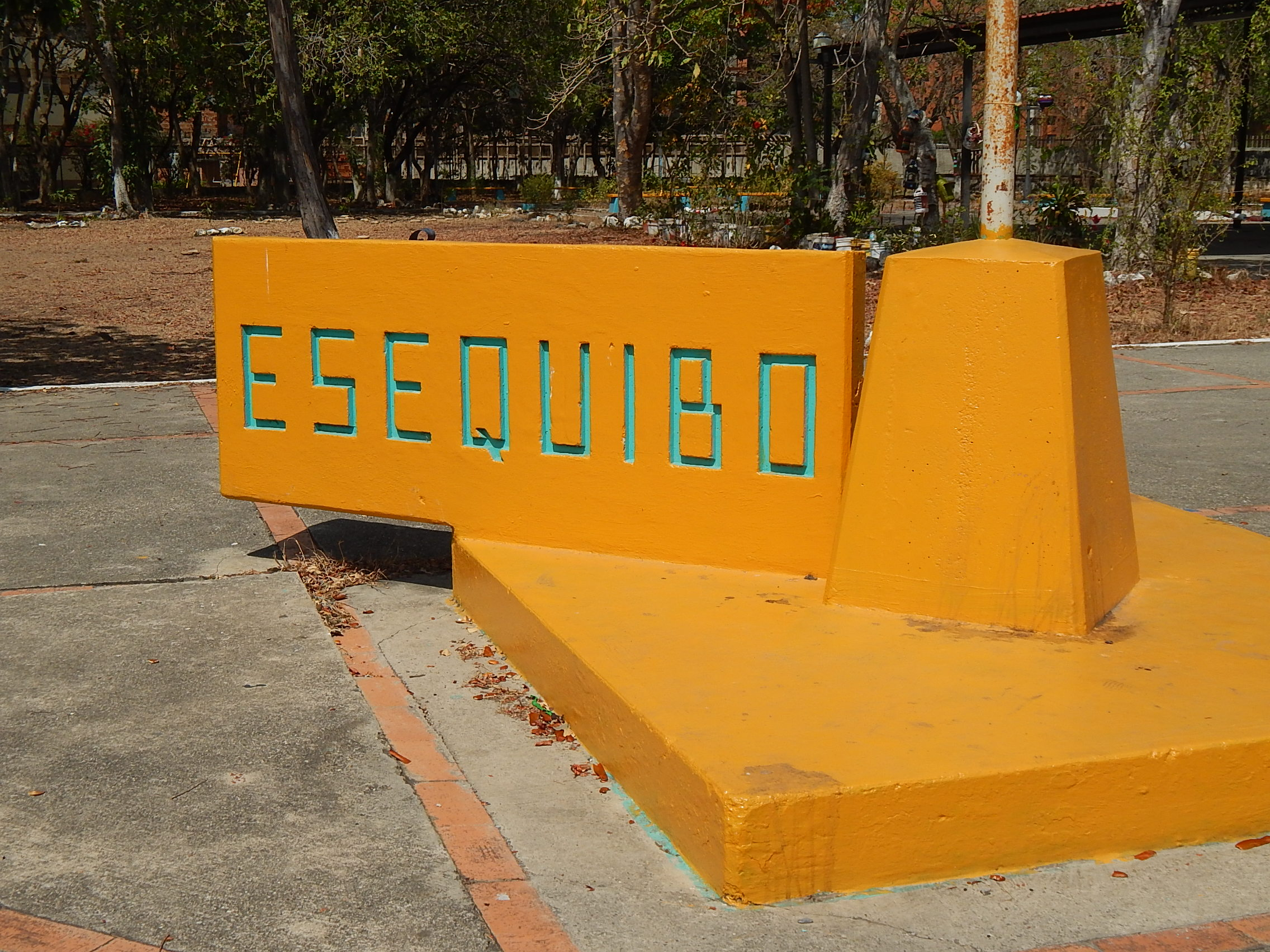 Nombre en el Parque Esequibo